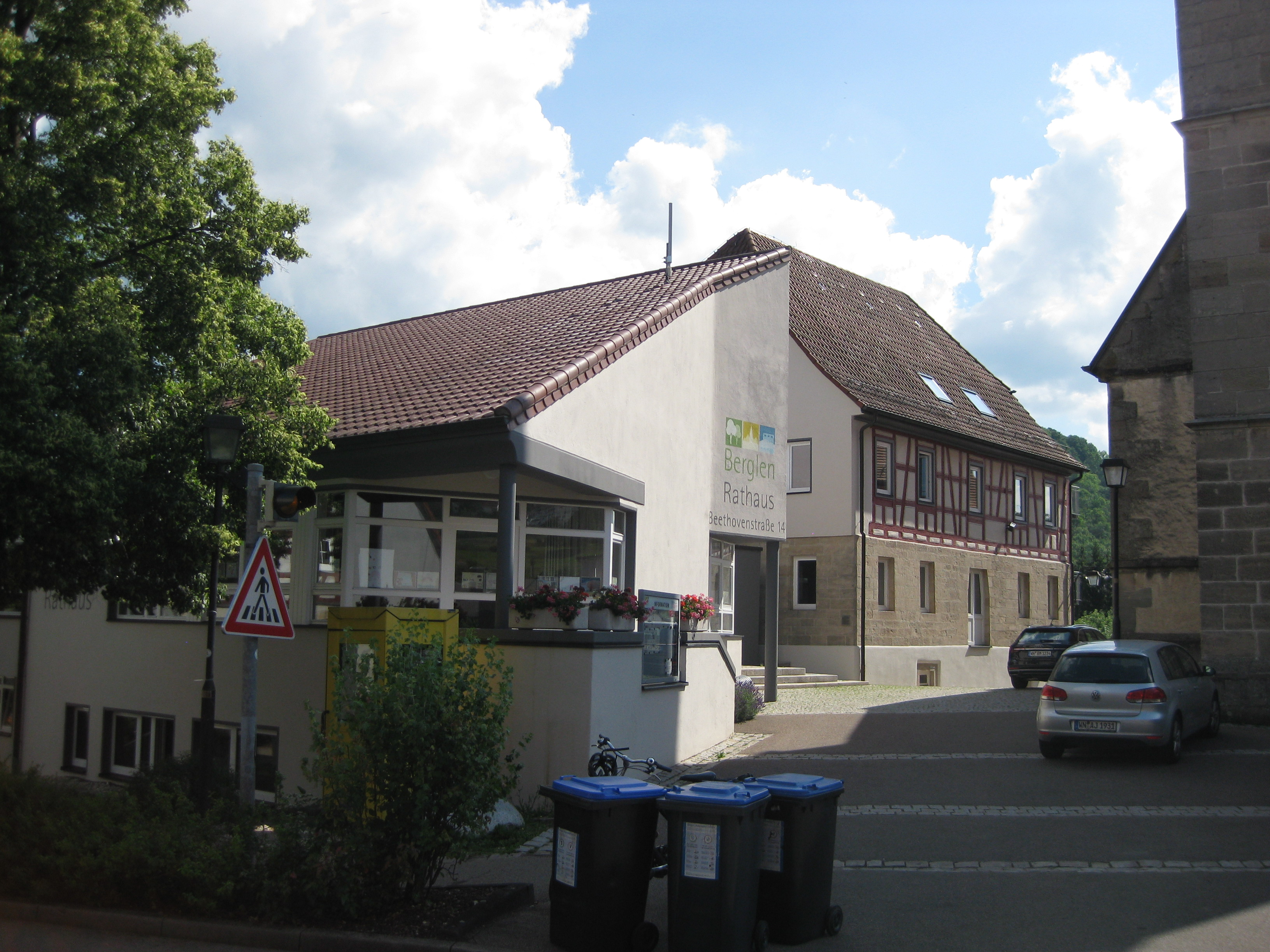 Berglen-Oppelsbohm im Jahr 2020